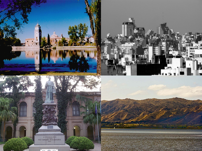 Montage de fotos de la Provincia de Córdoba